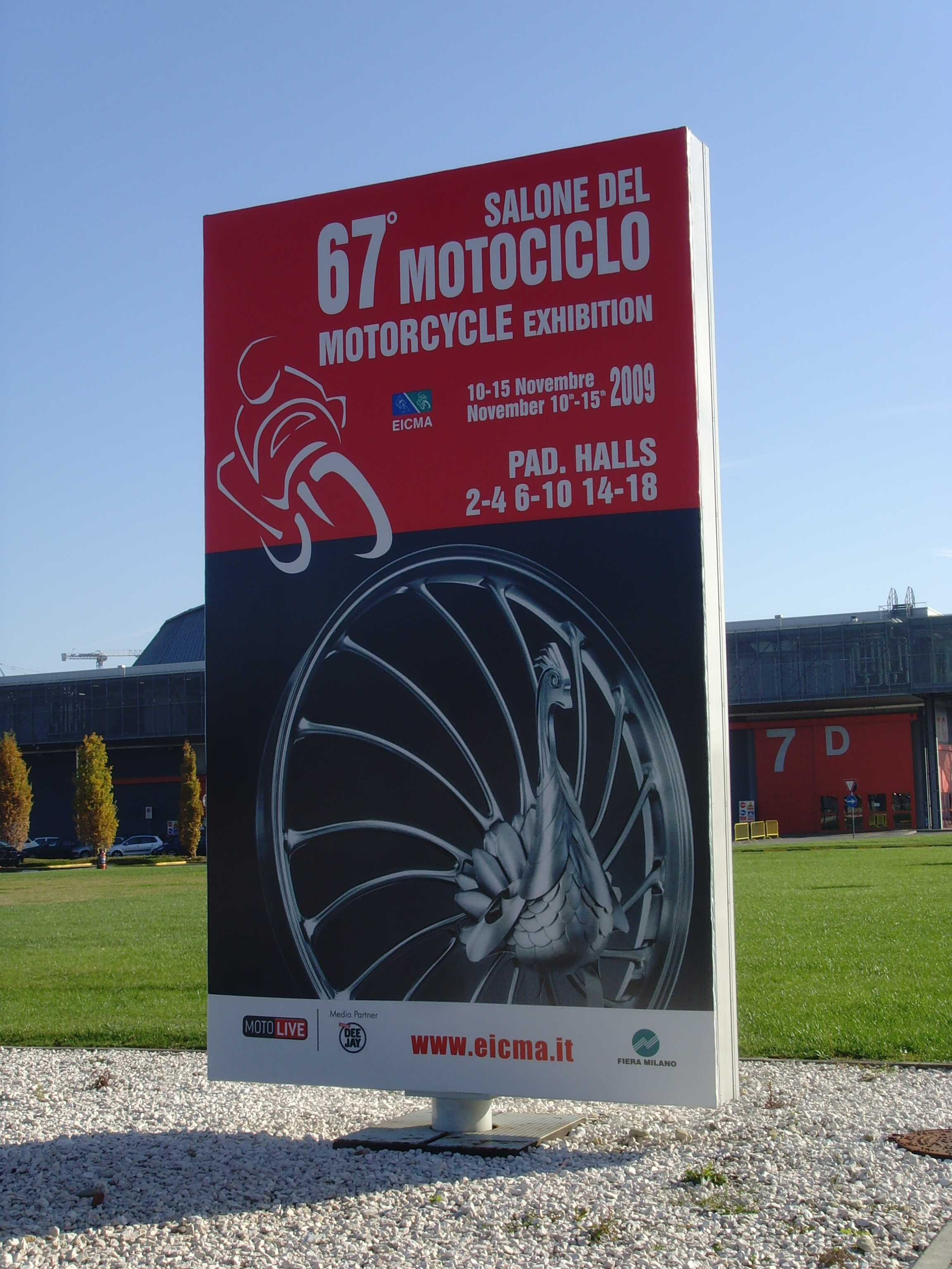 67 Salone del Motociclo, EICMO 2009, Milano, 10-15 Novembre 2009